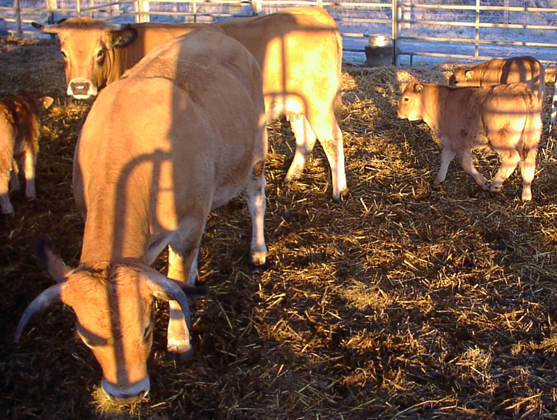 Aubrac-Kühe und Kälber im Offenstall. Fotograf: Norman Utke Ouelle: selbst 2004 aufgenommen